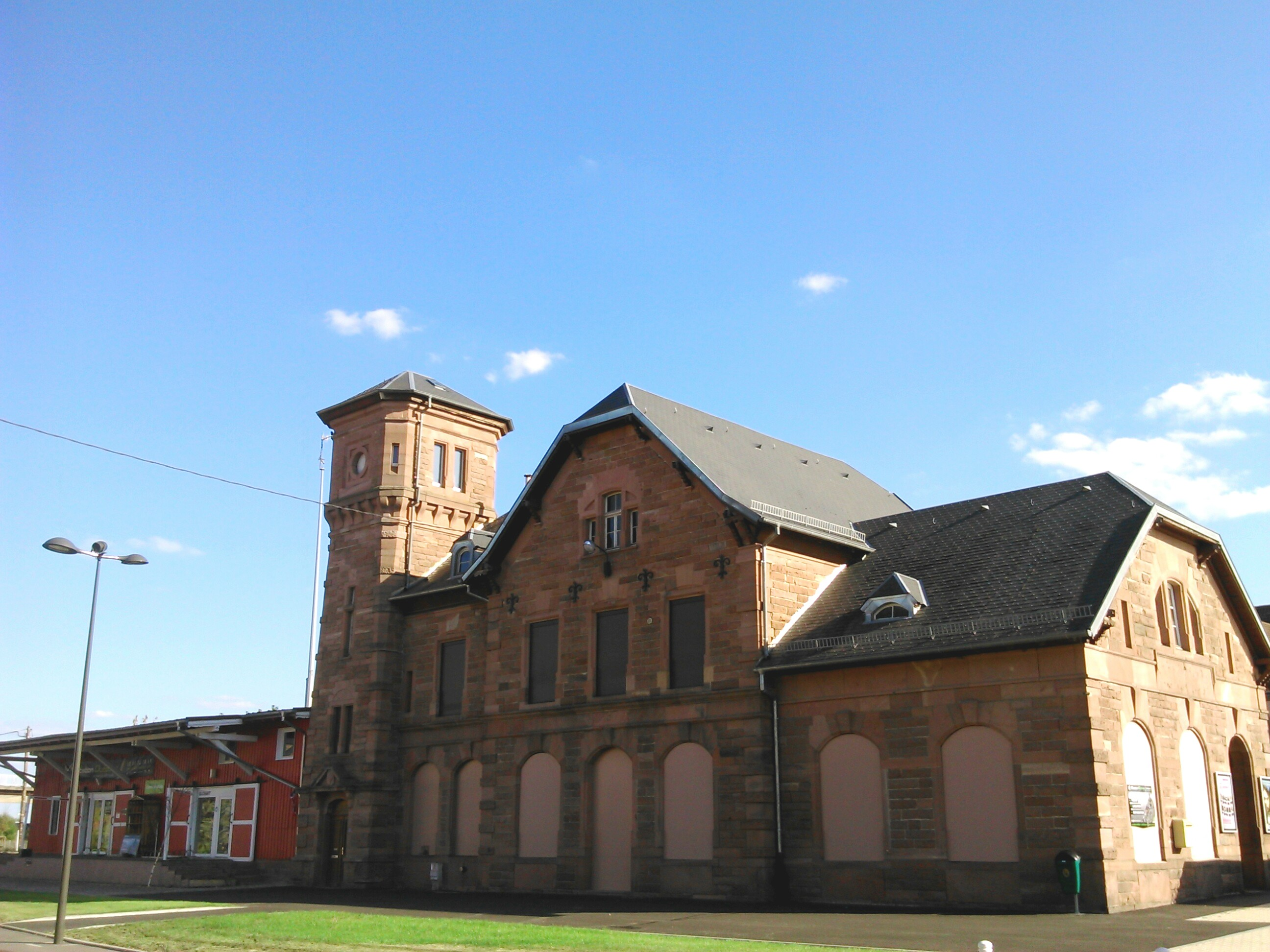 Gare de Mutzig.